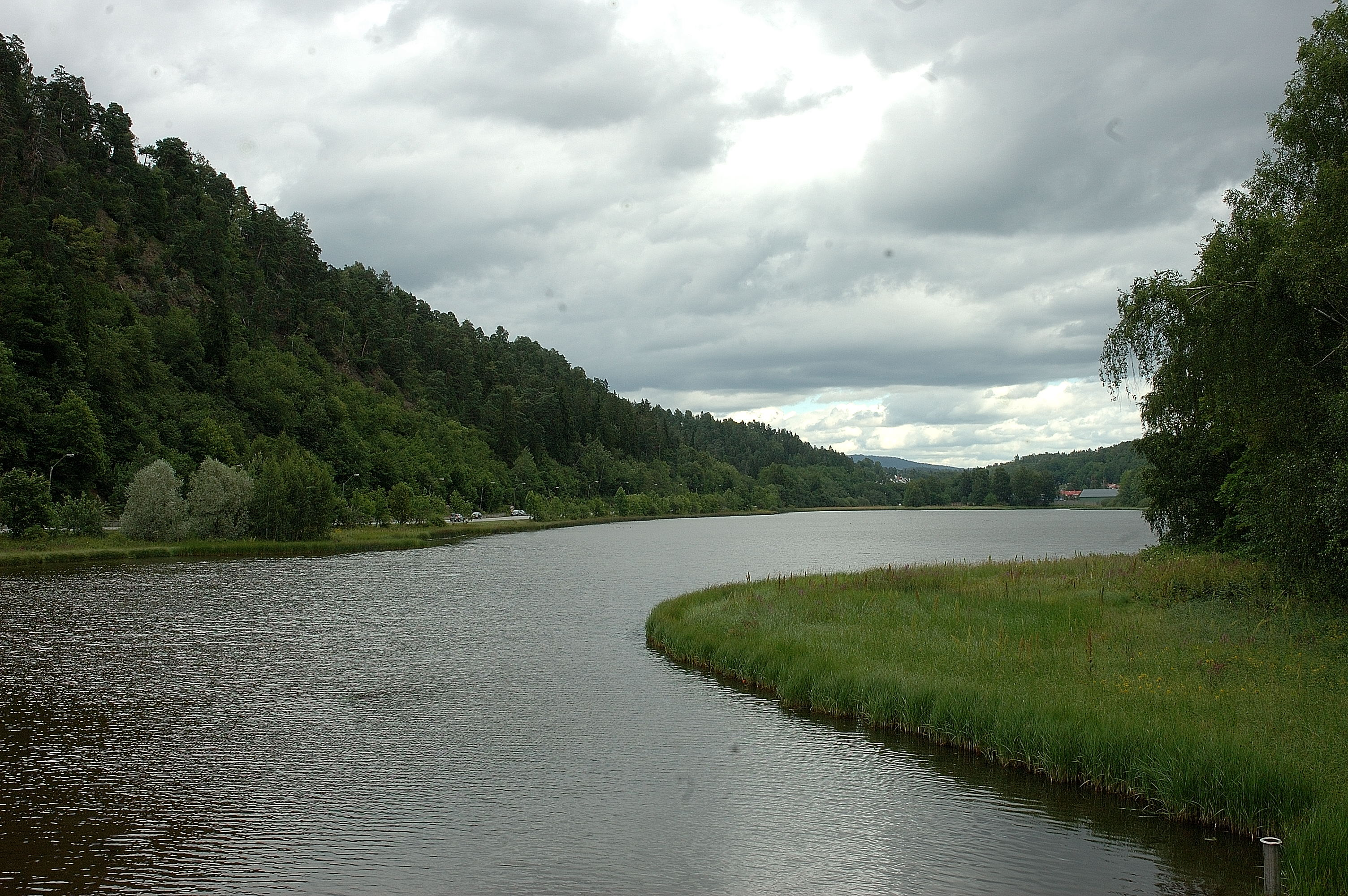 Lake Engervannet outside Sandvika in Norway Engervannet ved Sandvika i Bærum